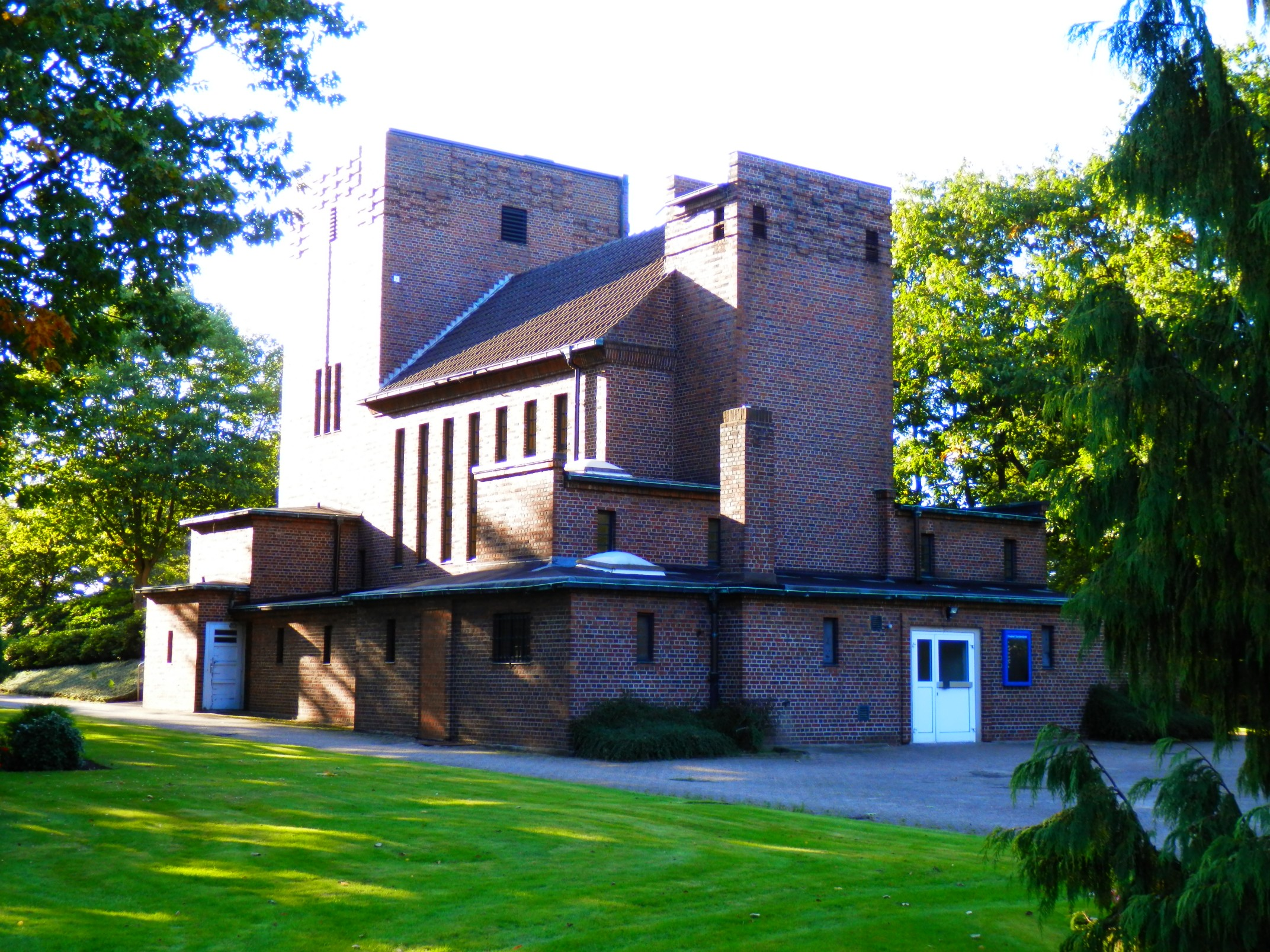 Friedhofskapelle der ev. luth. Gemeinde Geestemünde in Bremerhaven, Feldstraße 15-27Das abgebildete Objekt ist ein geschütztes Kulturdenkmal in der Freien Hansestadt Bremen, mit der Nr. 3056 beim Landesamt für Denkmalpflege registriert.